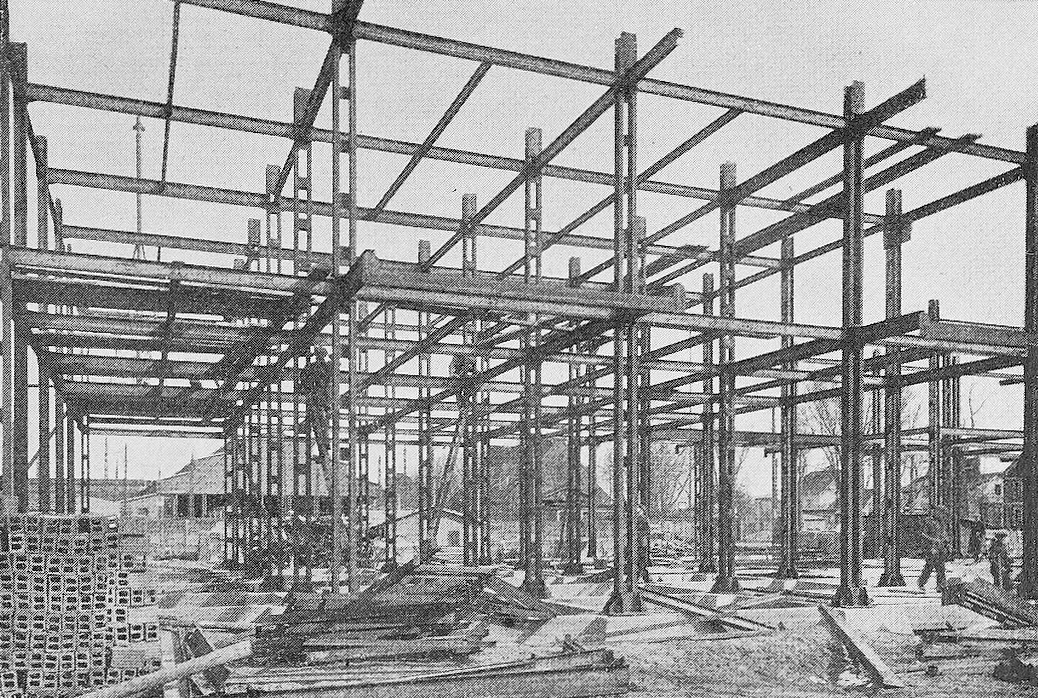 Szkielet budynku Adolfa Radinga. Źródło